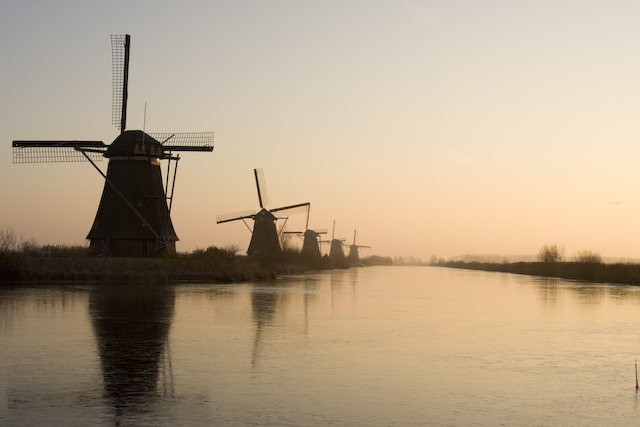 Dutch Windmills at Sunset.